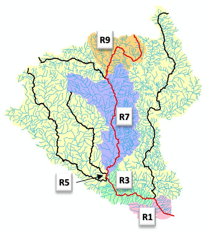 Códigos de Otto Pfafstetter das interbacias do Rio Trombetas